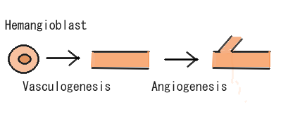 Angiogenesis